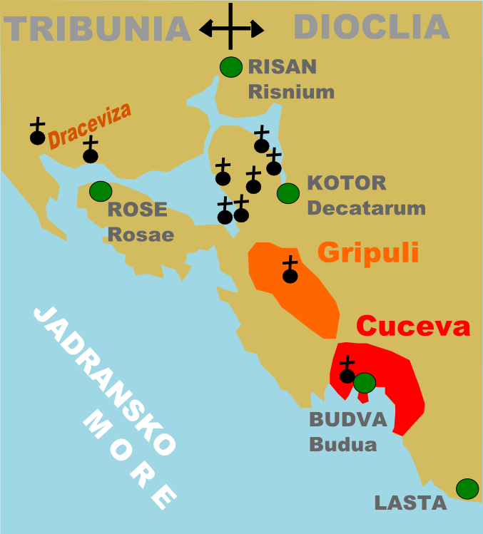 Gripuli i Kukeva župe, u XI vijeku.